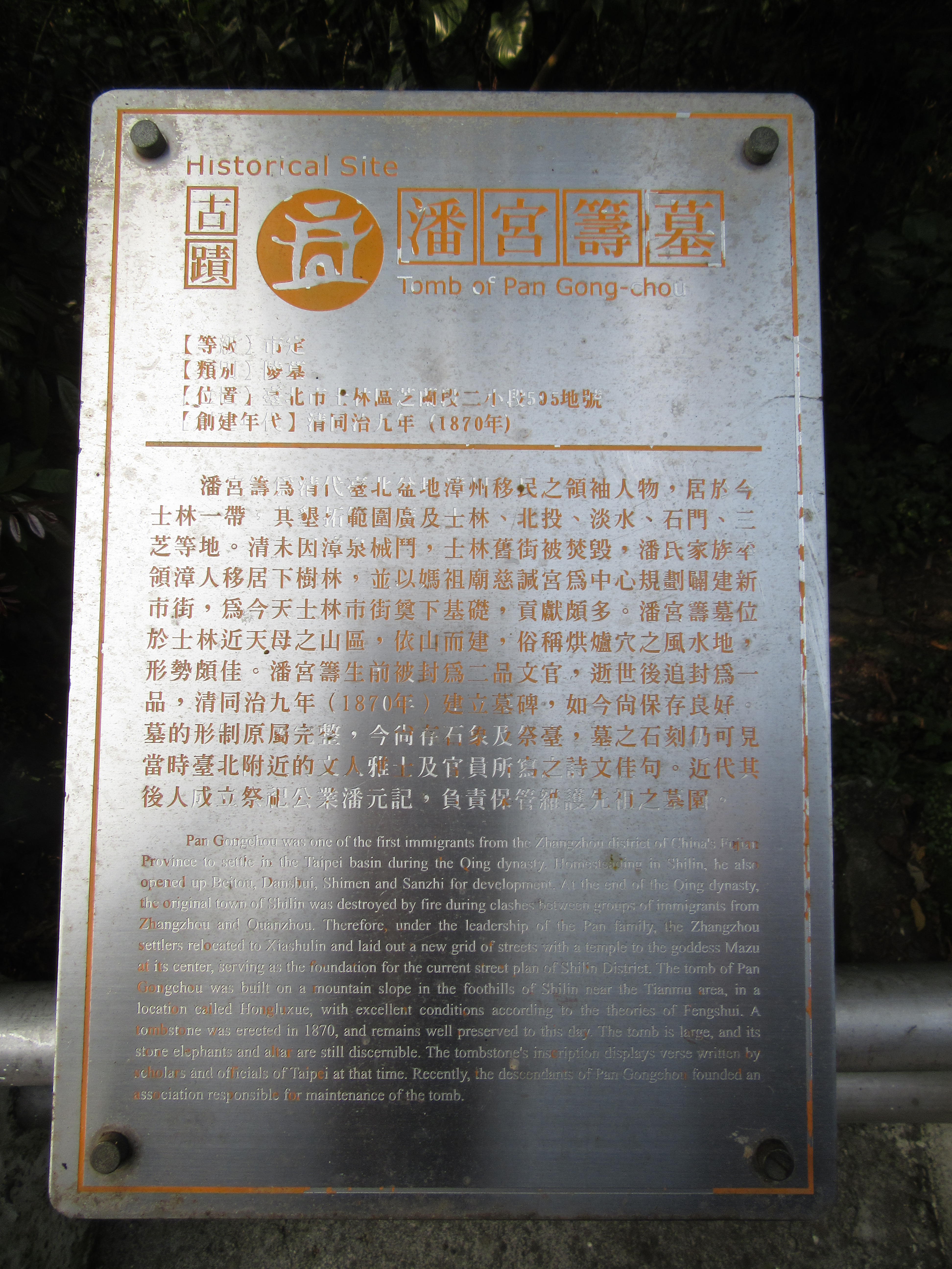 中文（台灣）: 潘宮籌墓介紹公告